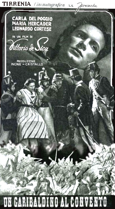 " Un garibaldino al convento" ( De Sica 1942) - inserzione promozionale sul periodico "Primi piani" del 1942.